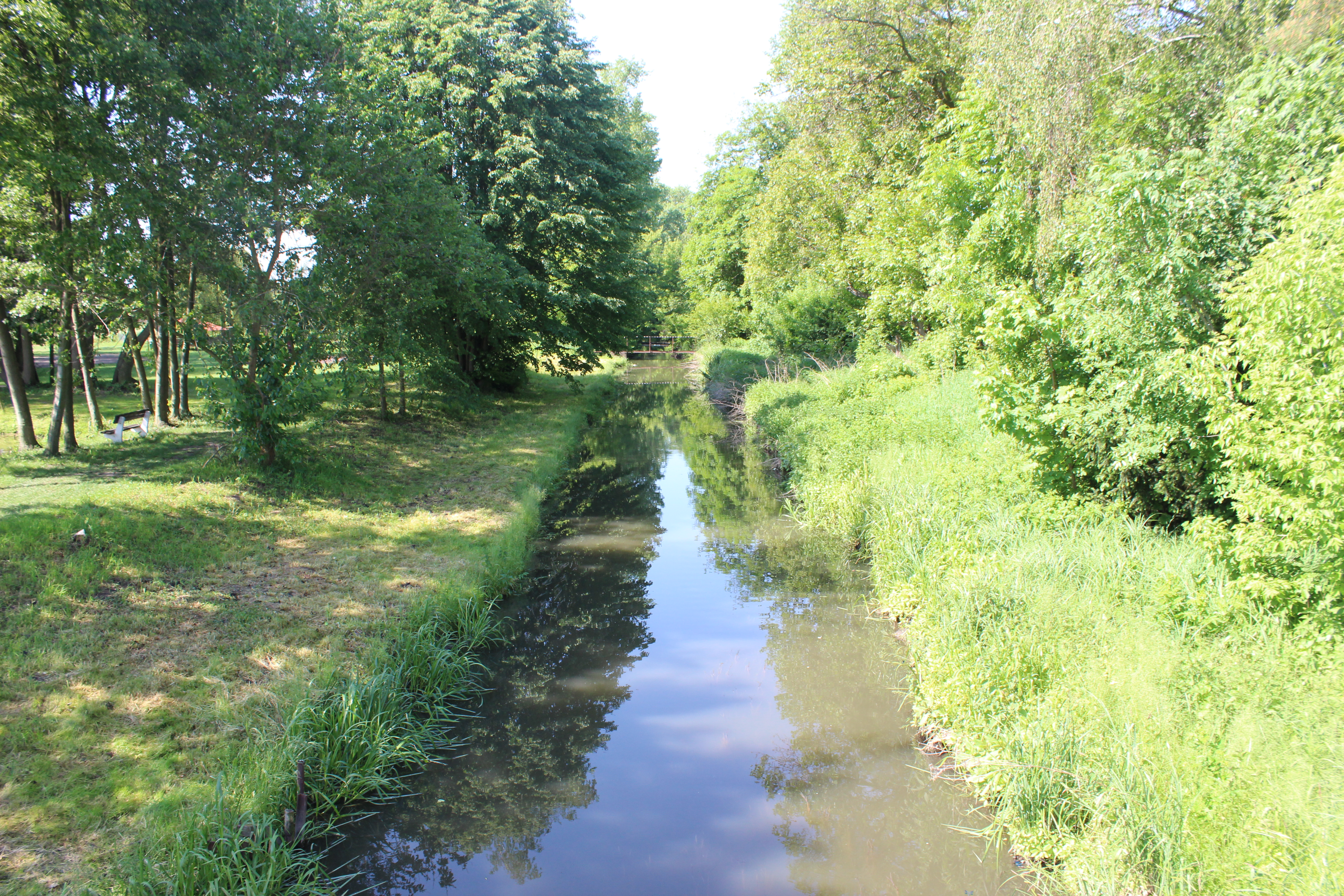 Řeka Vlkava protékající vesnicí Zbožíčko. Project: Fotíme Česko.